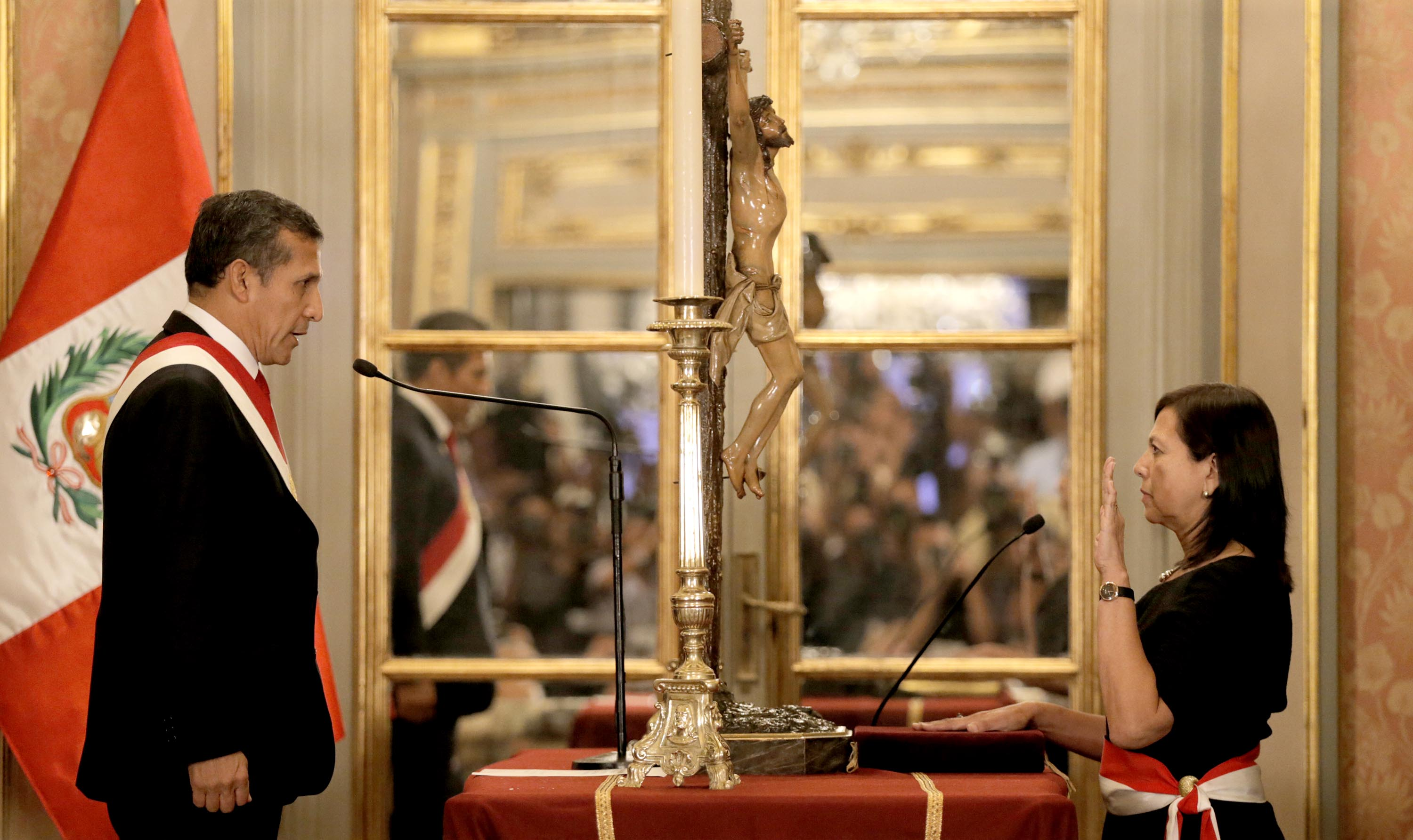 La embajadora Ana María Sánchez Vargas de Ríos, juramentando como Ministra de Relaciones Exteriores del Perú, el 2 de abril de 2015.